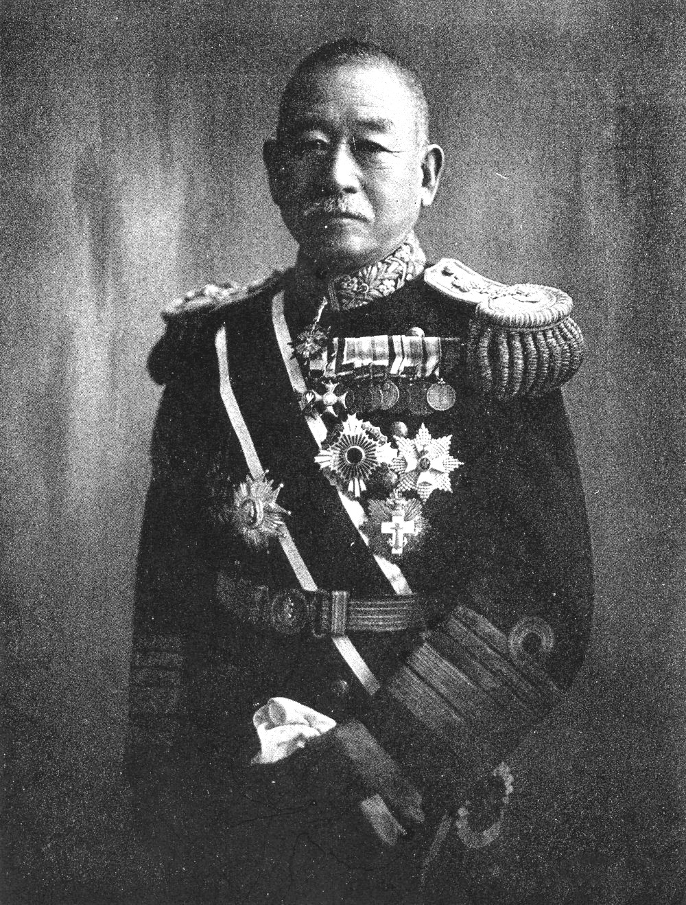 この写真は、岡田啓介（1868-1952）の重臣時代の写真です。